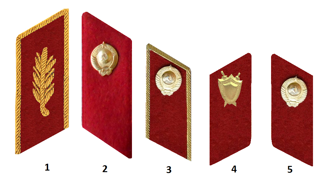 Петлицы1969